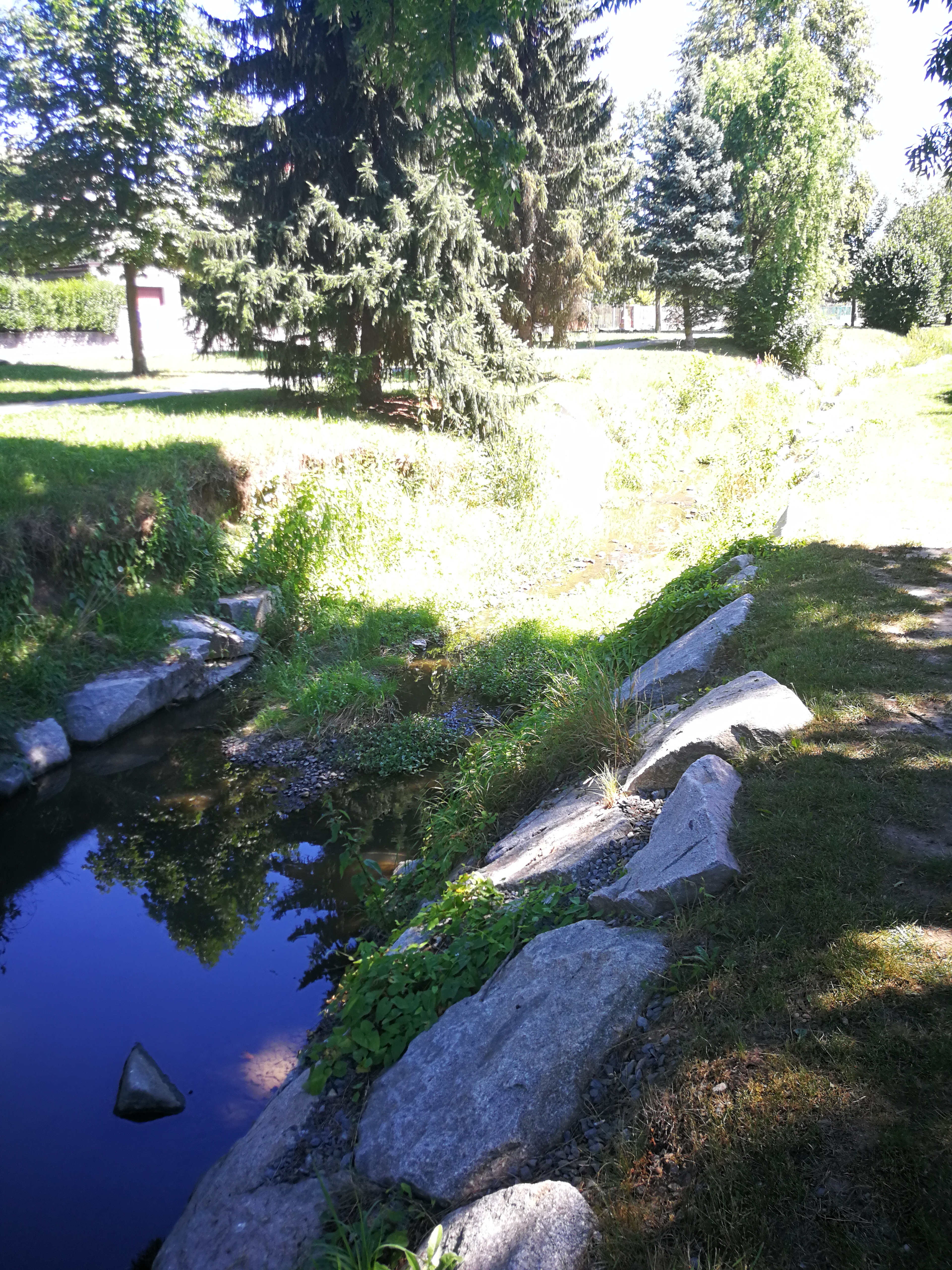 Rakovský potok Project: Fotíme Česko